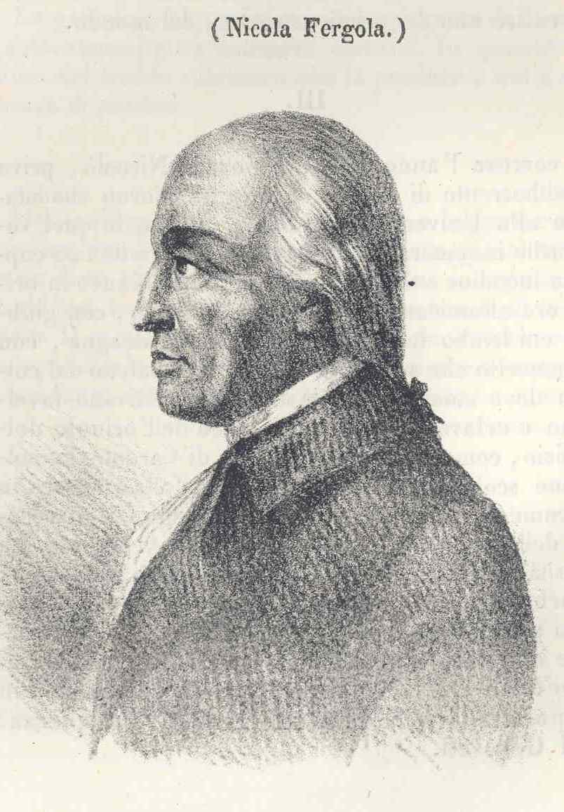 autorre sconosciuto, tratto da Poliorama Pittoresco 1836, ritratto di Nicola Fergola: incisione da disegno, opera il cui autore è morto da più di 70 anni, acquisita da scanner